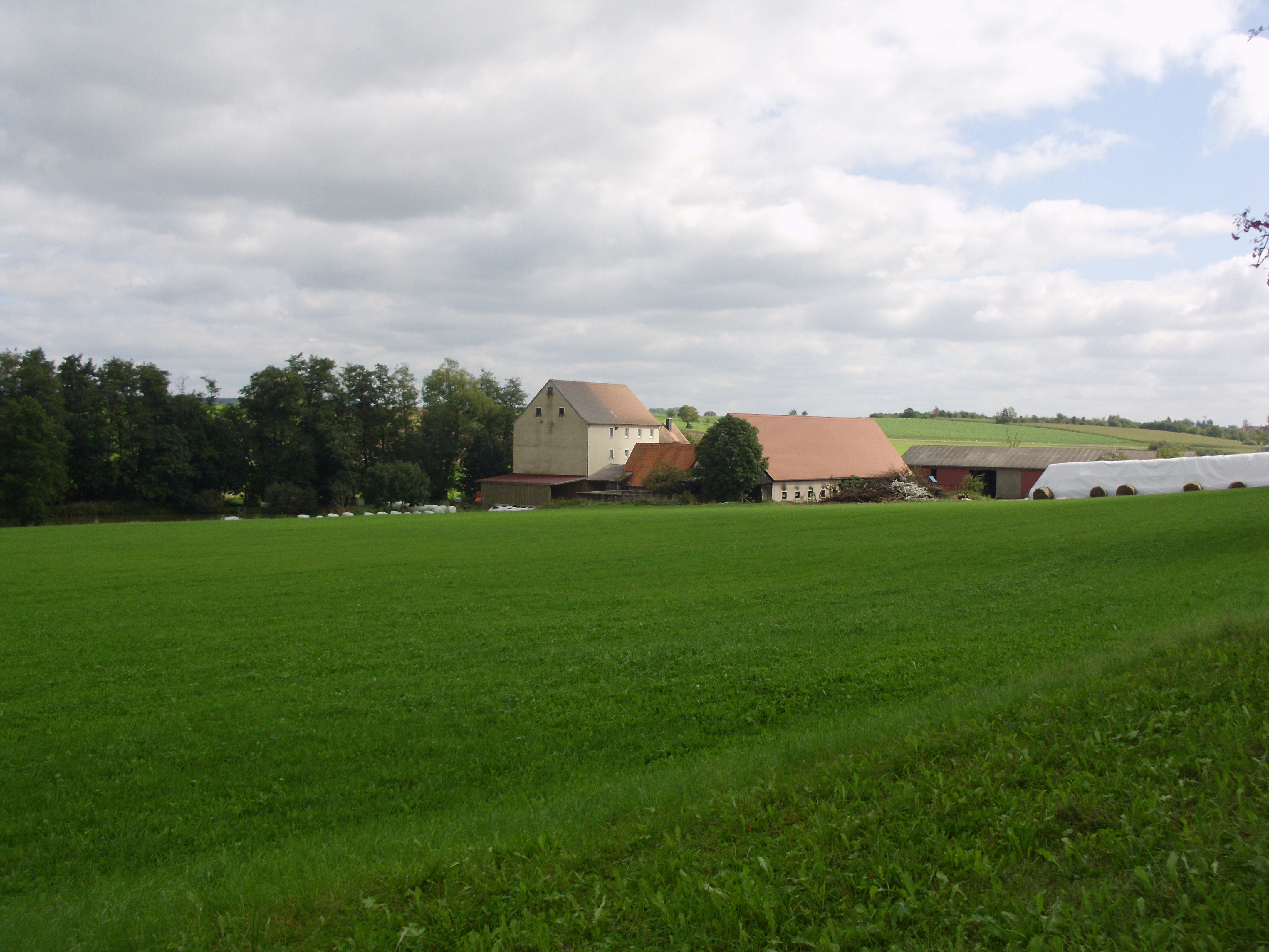 Wolfsmühle bei Jochsberg, Ortsteil der Stadt Leutershausen im mittelfränkischen Landkreis Ansbach